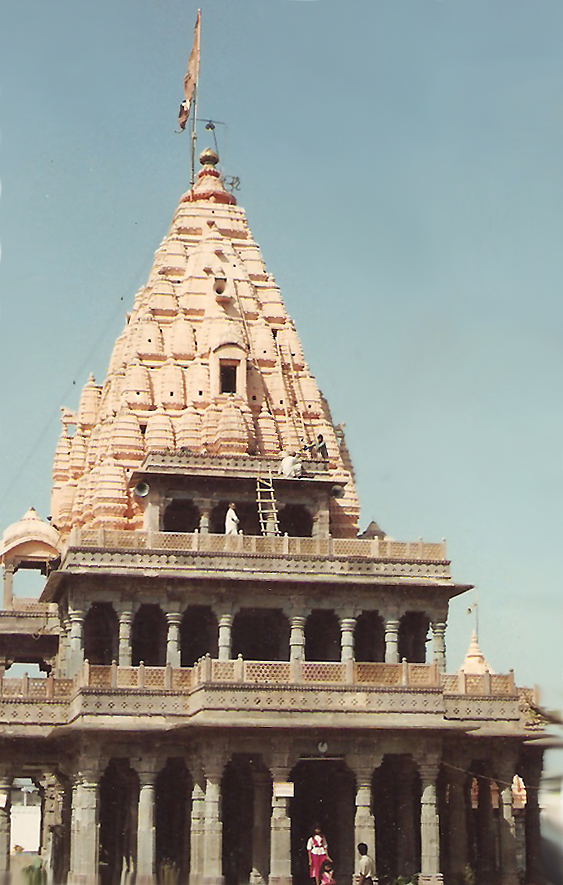 उज्जैन का प्रसिद्ध महाकालेश्वर मंदिर